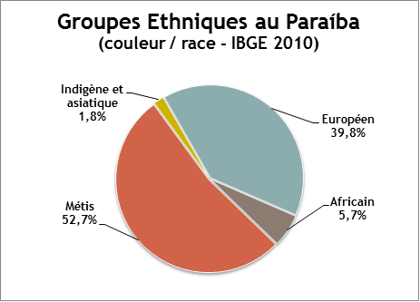 Groupes éthniques de l'Etat du Paraíba, au Brésil.